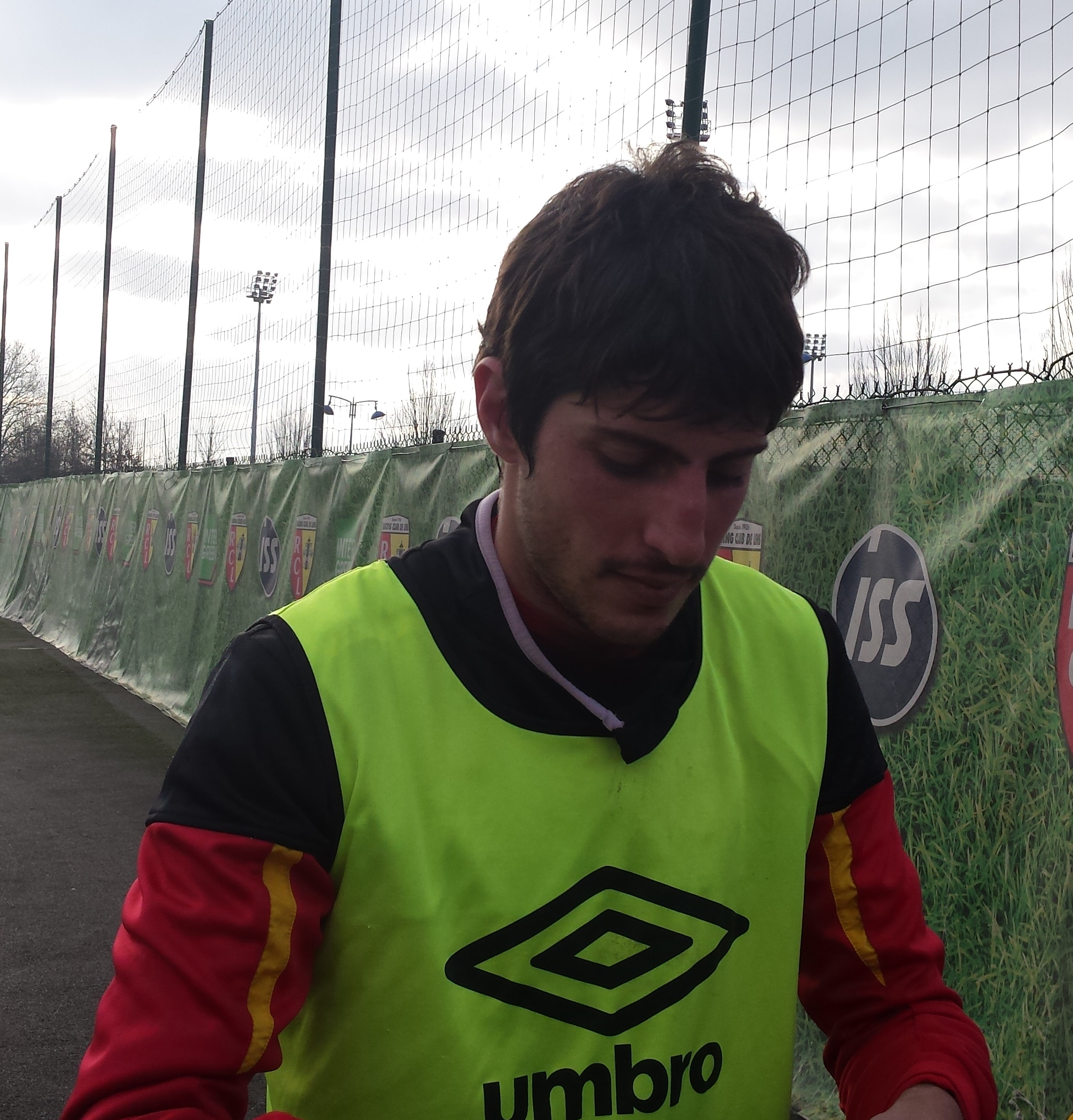 Pablo Chavarría après un entraînement public du Racing Club de Lens, le 31 décembre 2014, sur le terrain "San Siro" du Centre Technique et Sportif de La Gaillette.